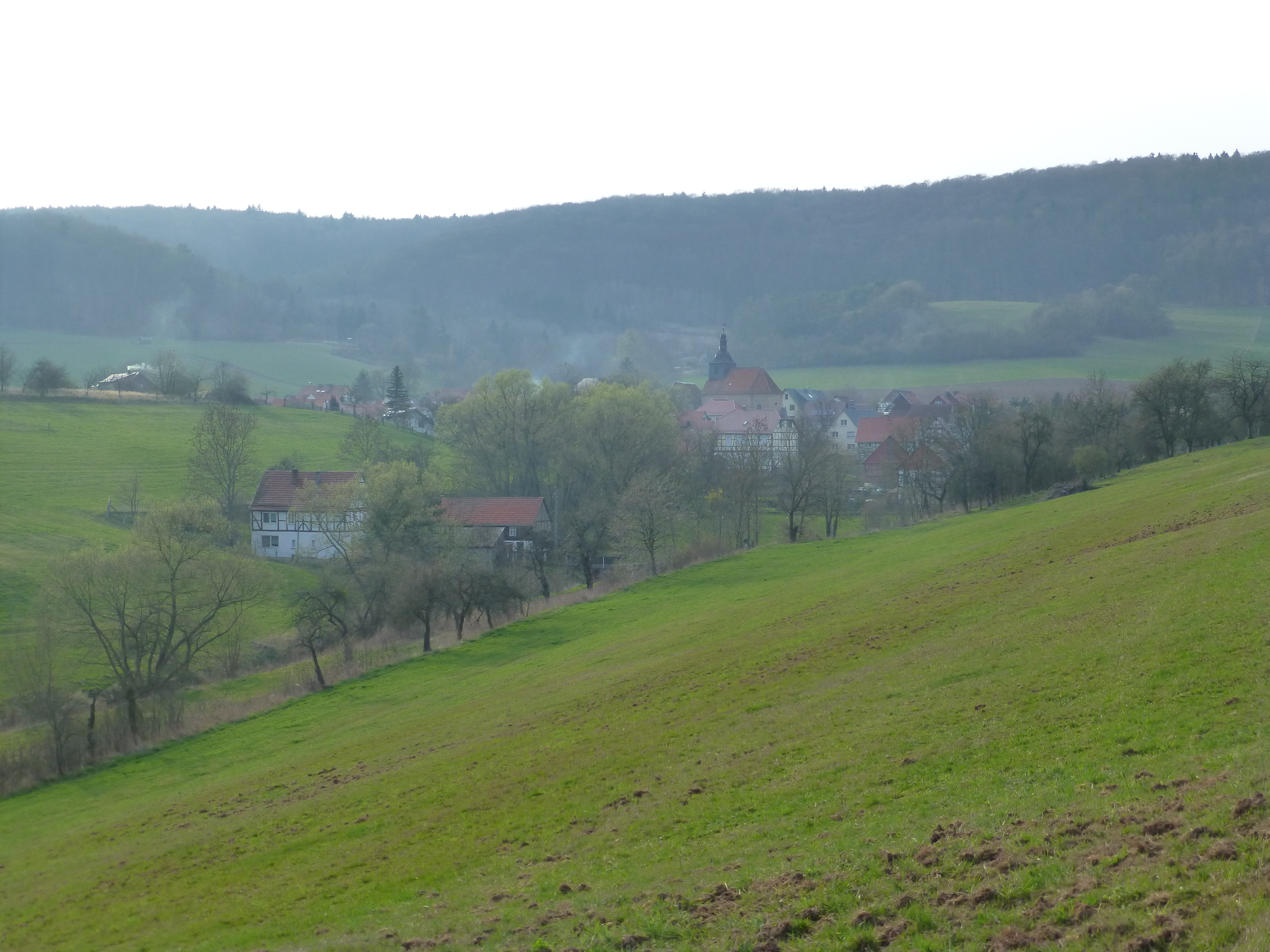 Volkerode im Eichsfeld